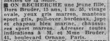 Avis de recherche pour Dora Bruder parue dans Paris-Soir le 31 décembre 1941